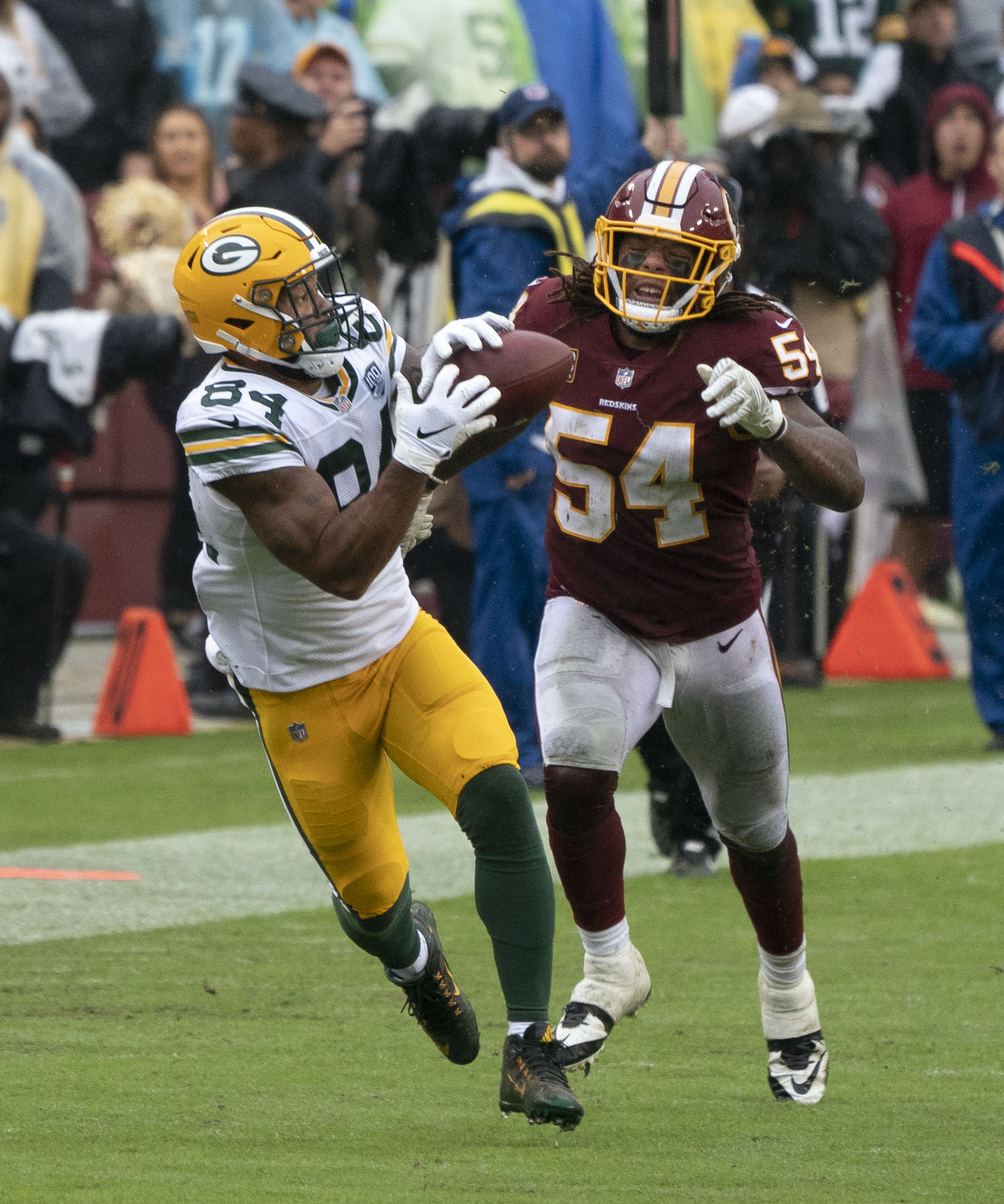 Packers at Redskins 09/23/18